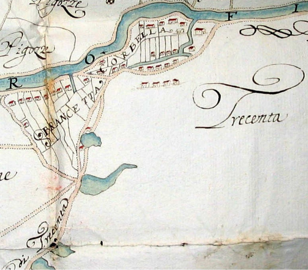 Mappa di Trecenta (particolare) realizzata nel 1683 da Carlo Golletti e Giobatta Franciosi